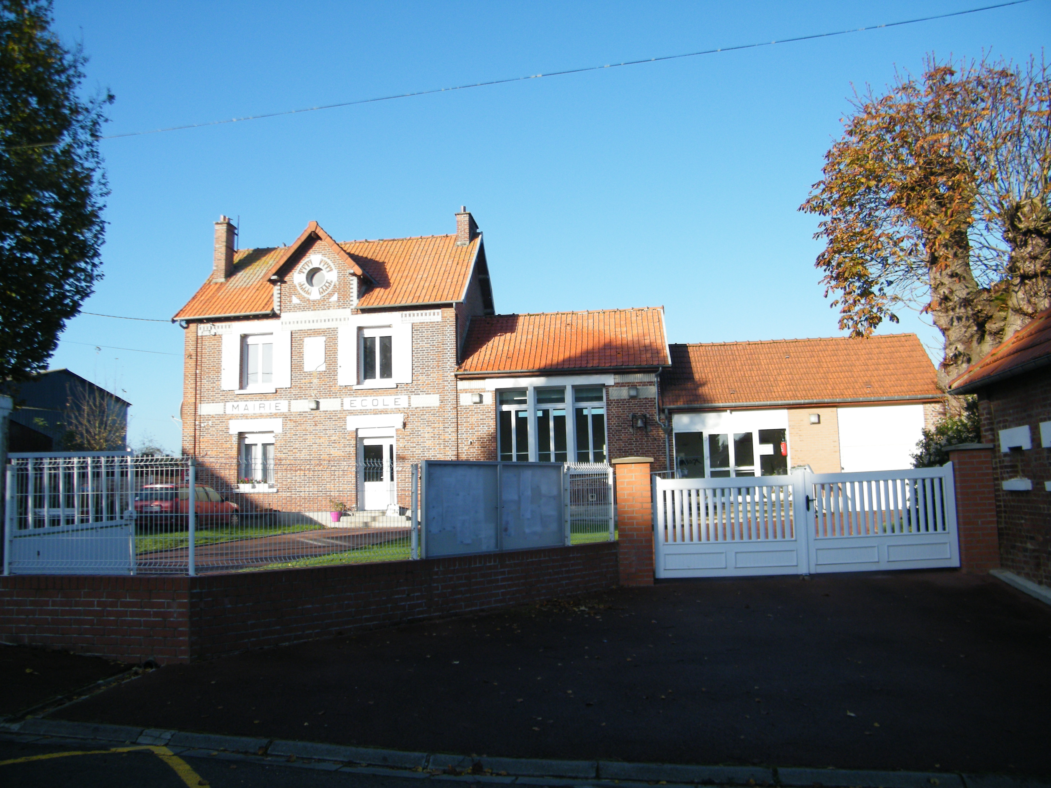 Bâtiments communaux : mairie-école, salle communale.